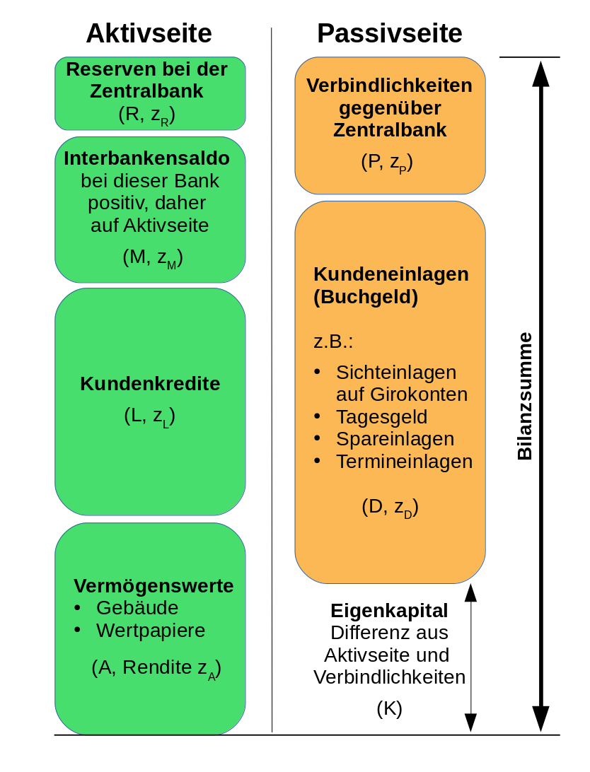 Vereinfachtes Beispiel einer Bankbilanz mit Reserven, positivem Interbankensaldo, Kundenkrediten, Sachvermögen, Kundeneinlagen und Eigenkapital. Die Großbuchstaben stehen für die genannte Position in der Bilanz, die korrespondierenden Kleinbuchstaben (z) mit Index für deren Verzinsung.